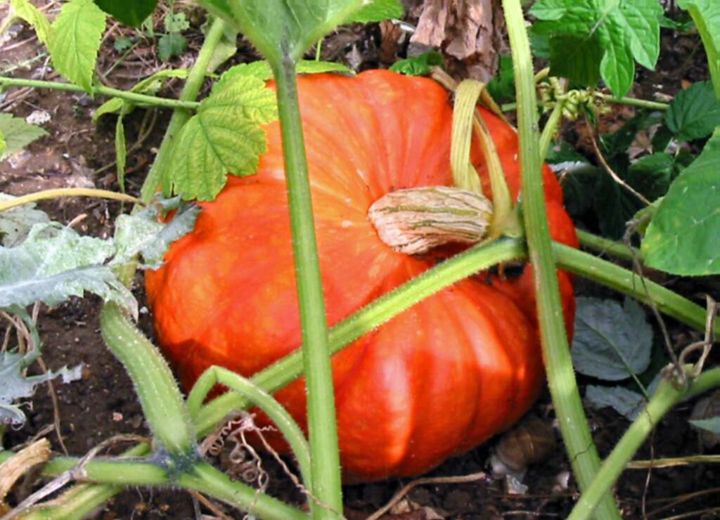 Potiron (Cucurbita maxima) Photo JH Mora, septembre 2004